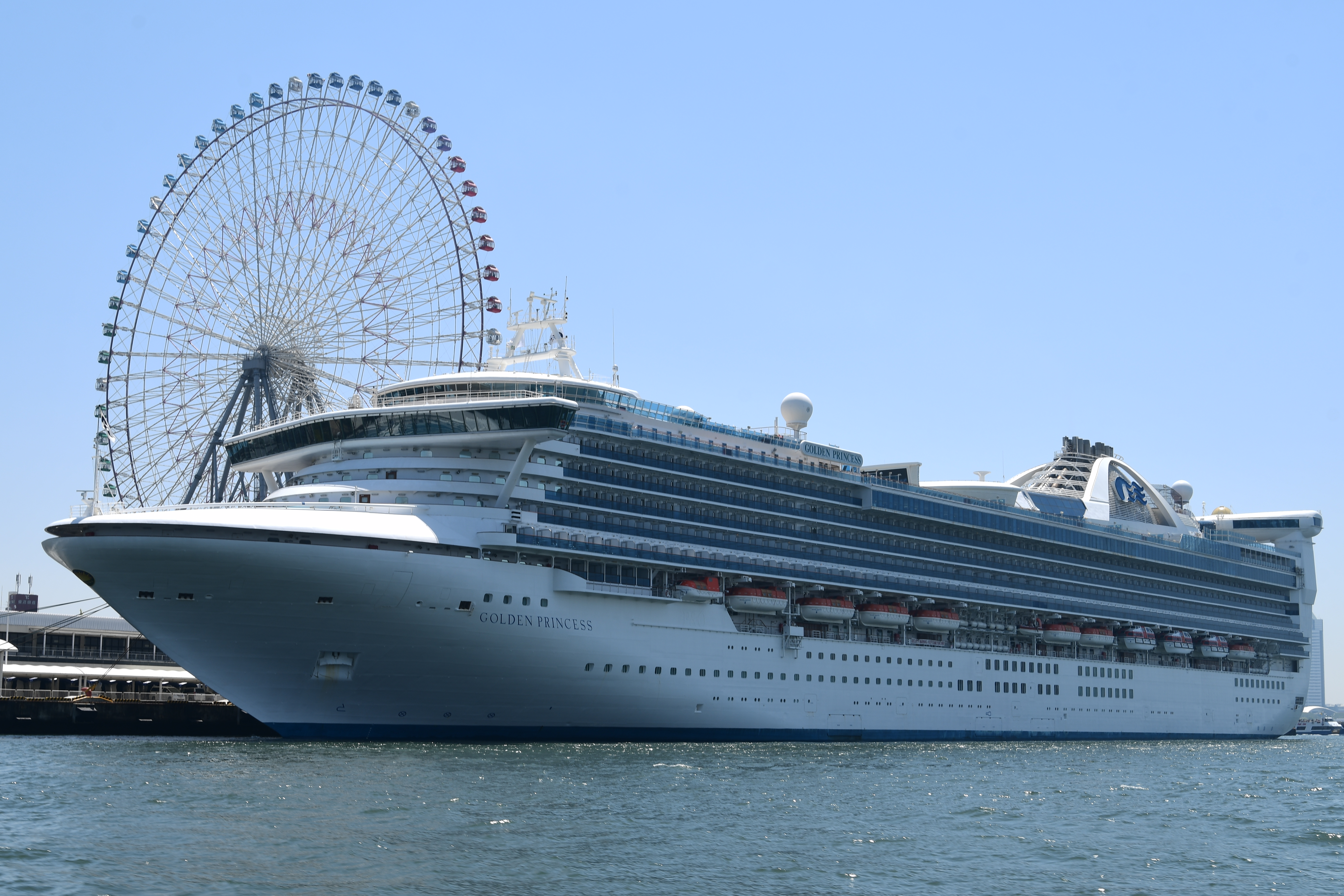 大阪天保山に停泊中のゴールデンプリンセス Nikon D7500